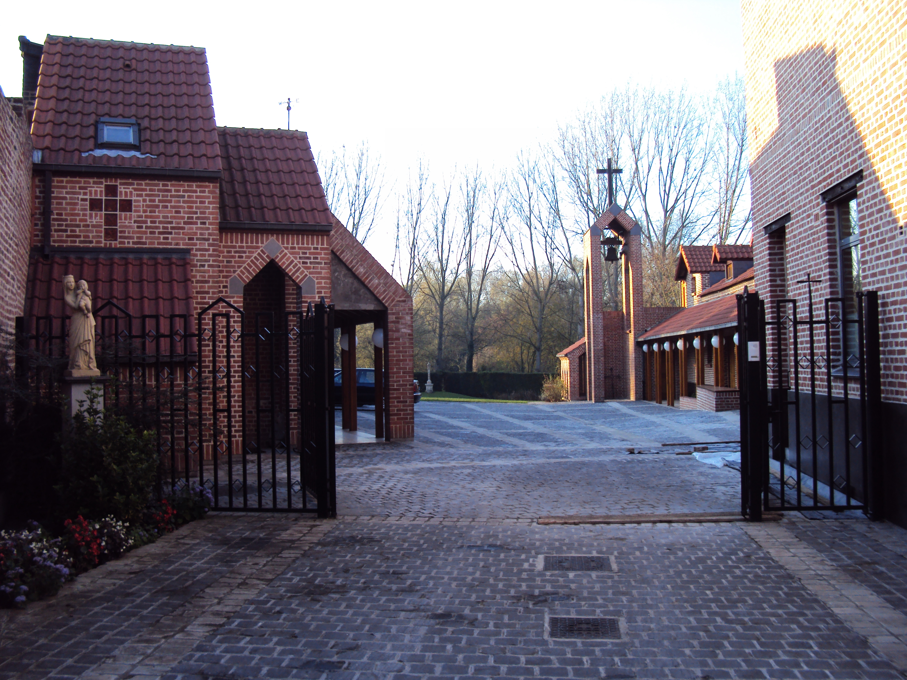 Entrée du couvent franciscain la "Maison Notre-Dame" à Éleu-dit-Leauwette (Pas-de-Calais, France).